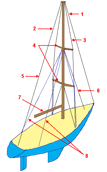 description : schéma gréement bermudien entete auteur : réalisation Pline